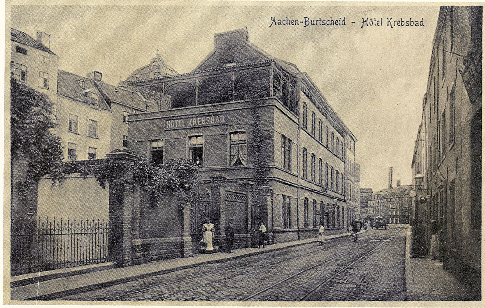 Krebsbad in Aachen -Burtscheid, 1915